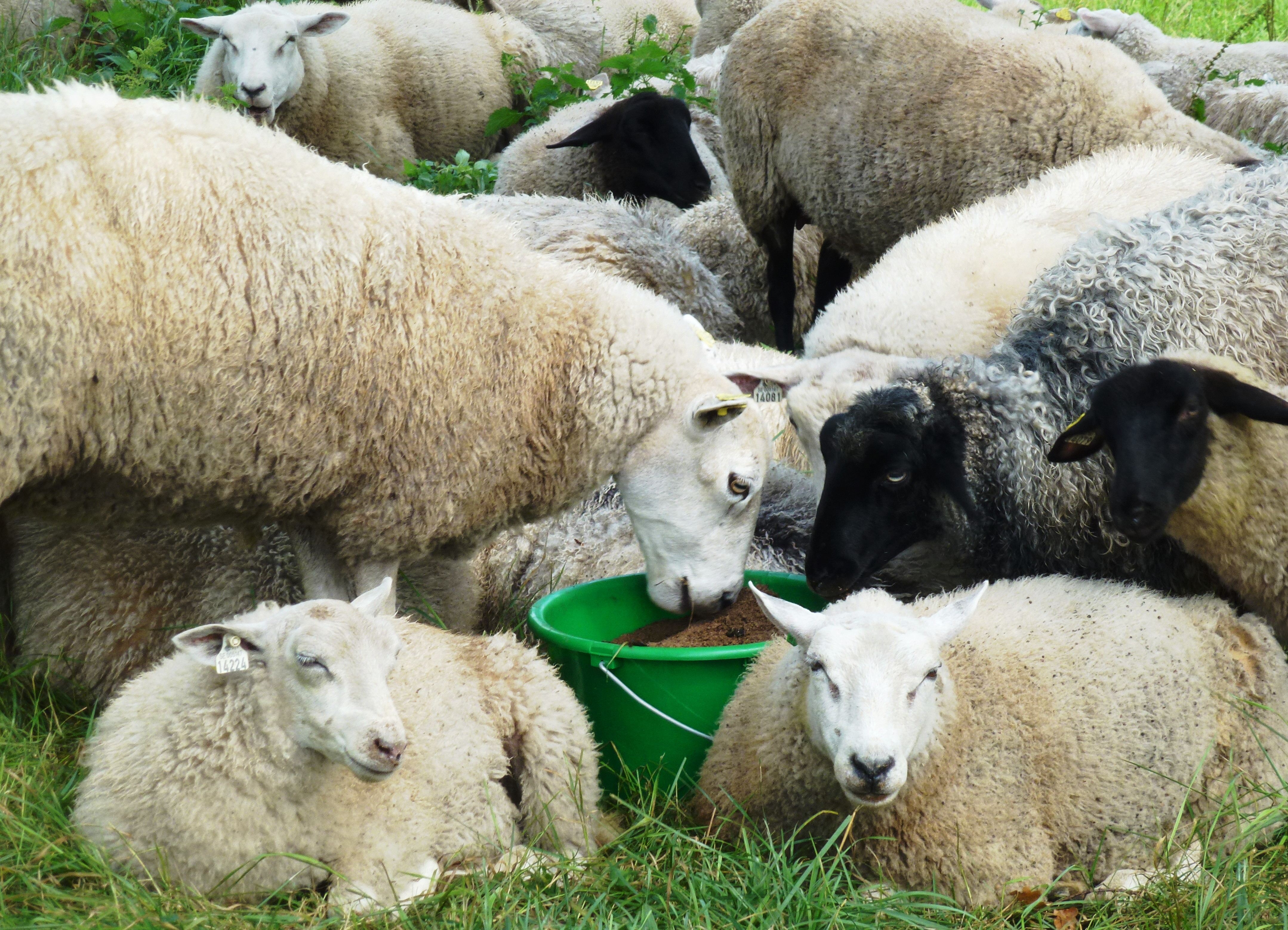 Får på Norra Djurgården vid Stora Skuggan